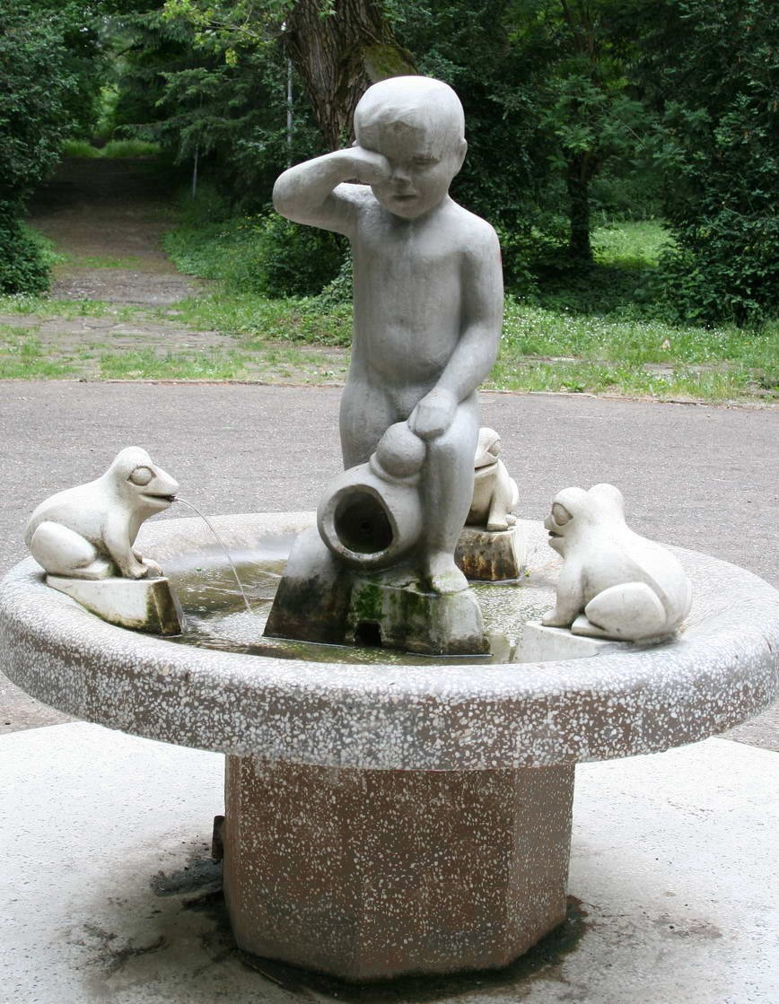 Скулптурната композиция "Плачещото дете" в Градската градина на Попово - 2007 год.